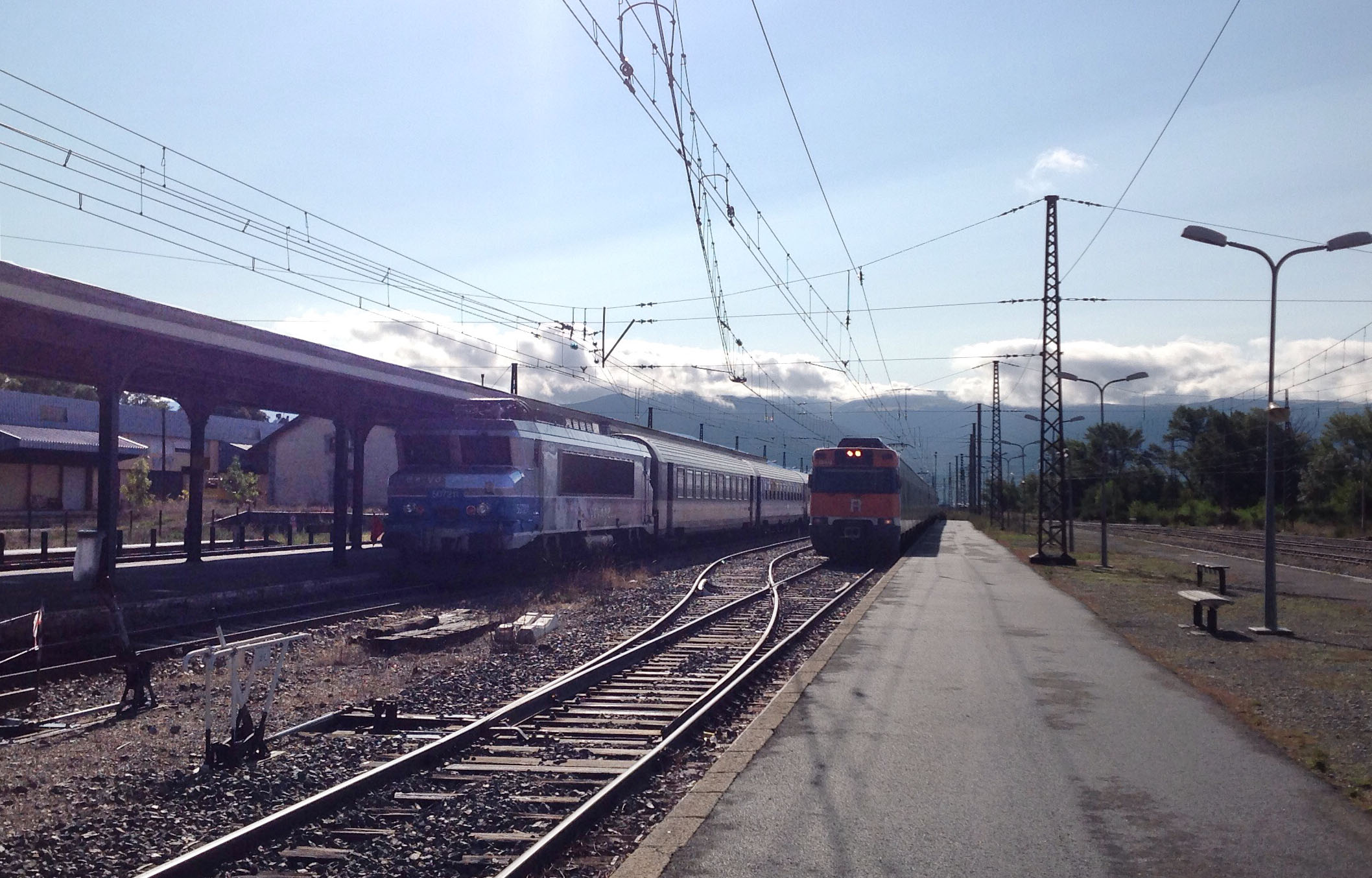 Tren Rodalies entran a l'estació Tor de Querol